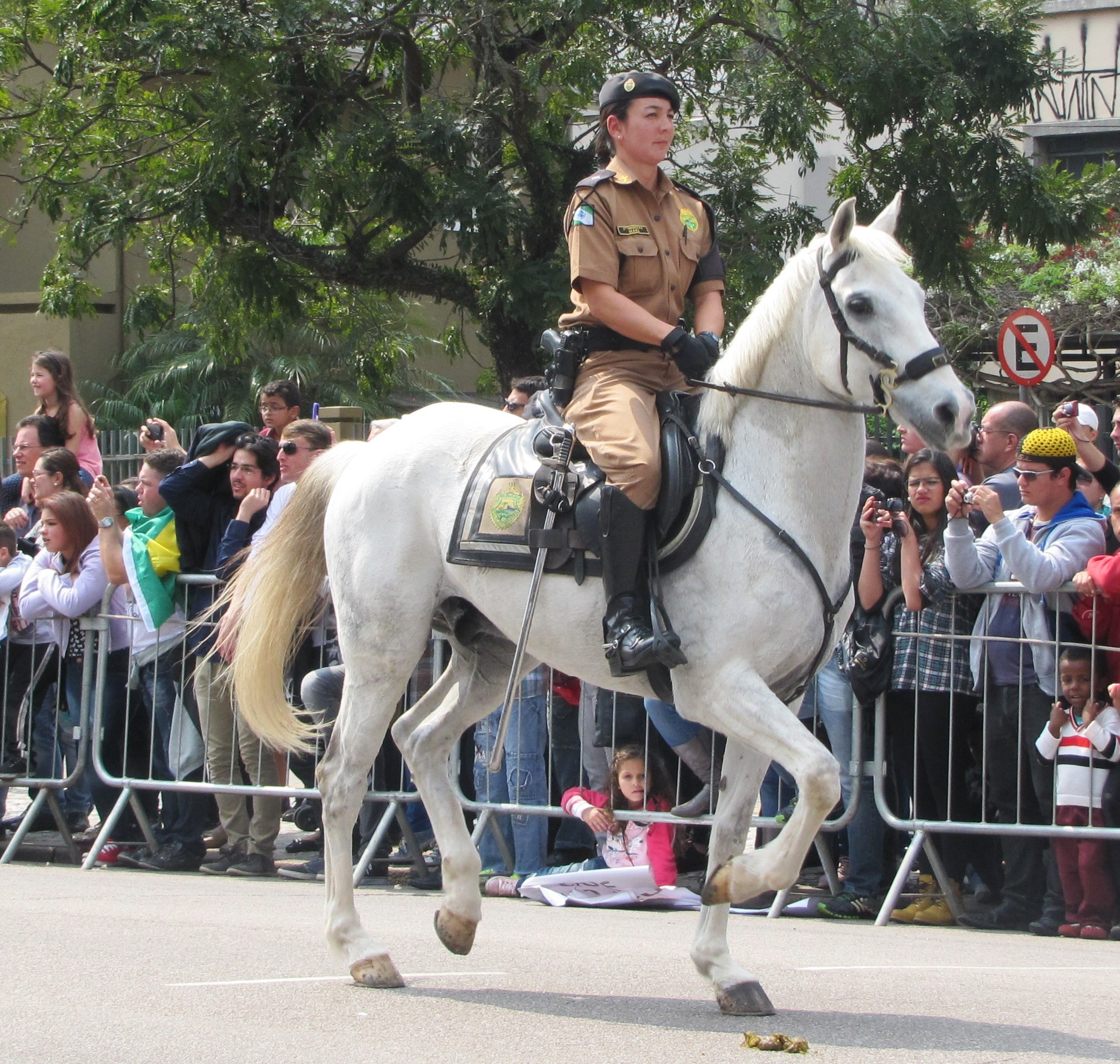 Oficial comandante do Pelotão Montado Feminino, PMPR.